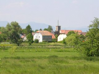 village de Montreux-Château (Territoire de Belfort) Photo prise en mai 2004 par LP90 Copyright : licence GFDL LP90 mai 2004